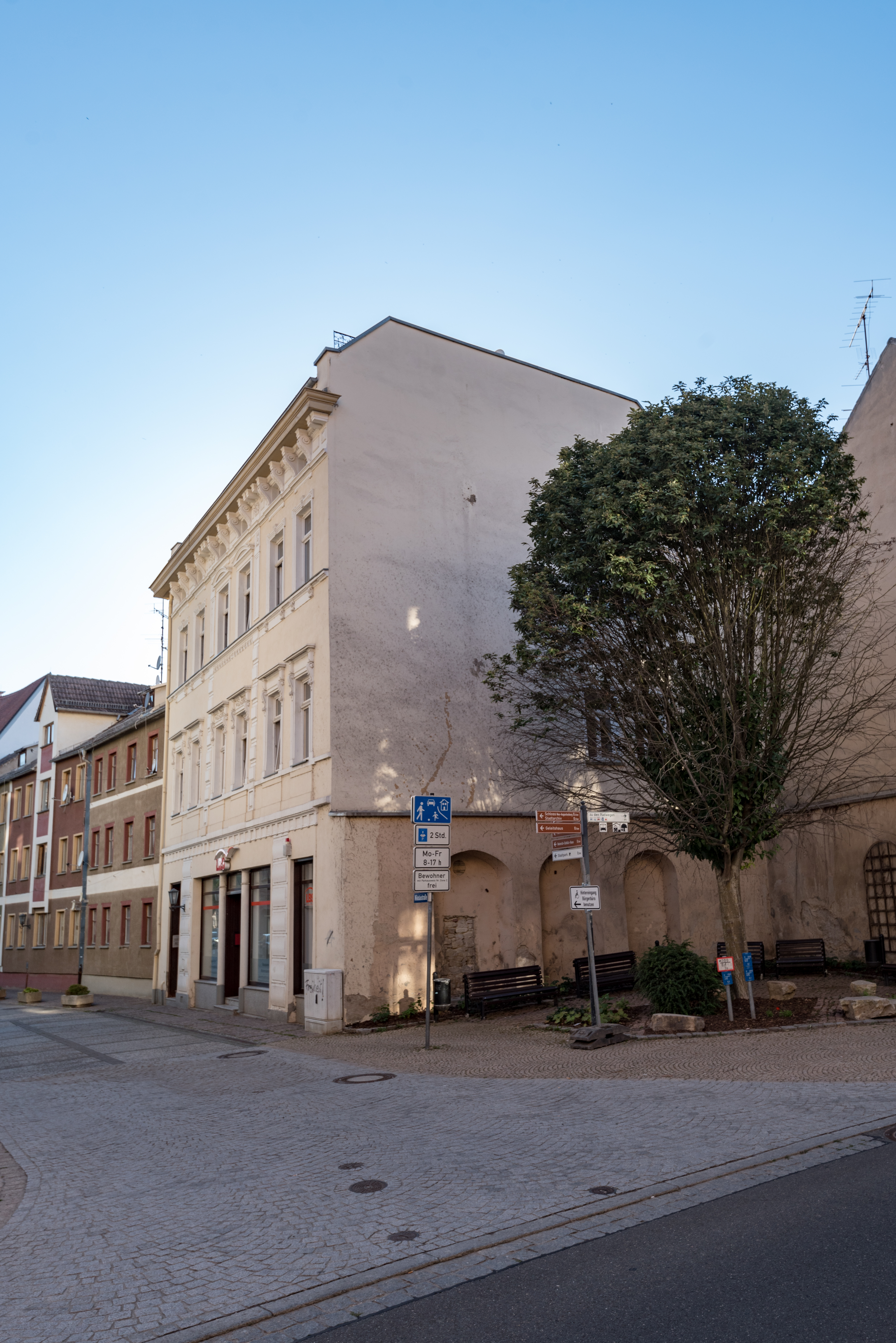 Weißenfels, Nikolaistraße 1